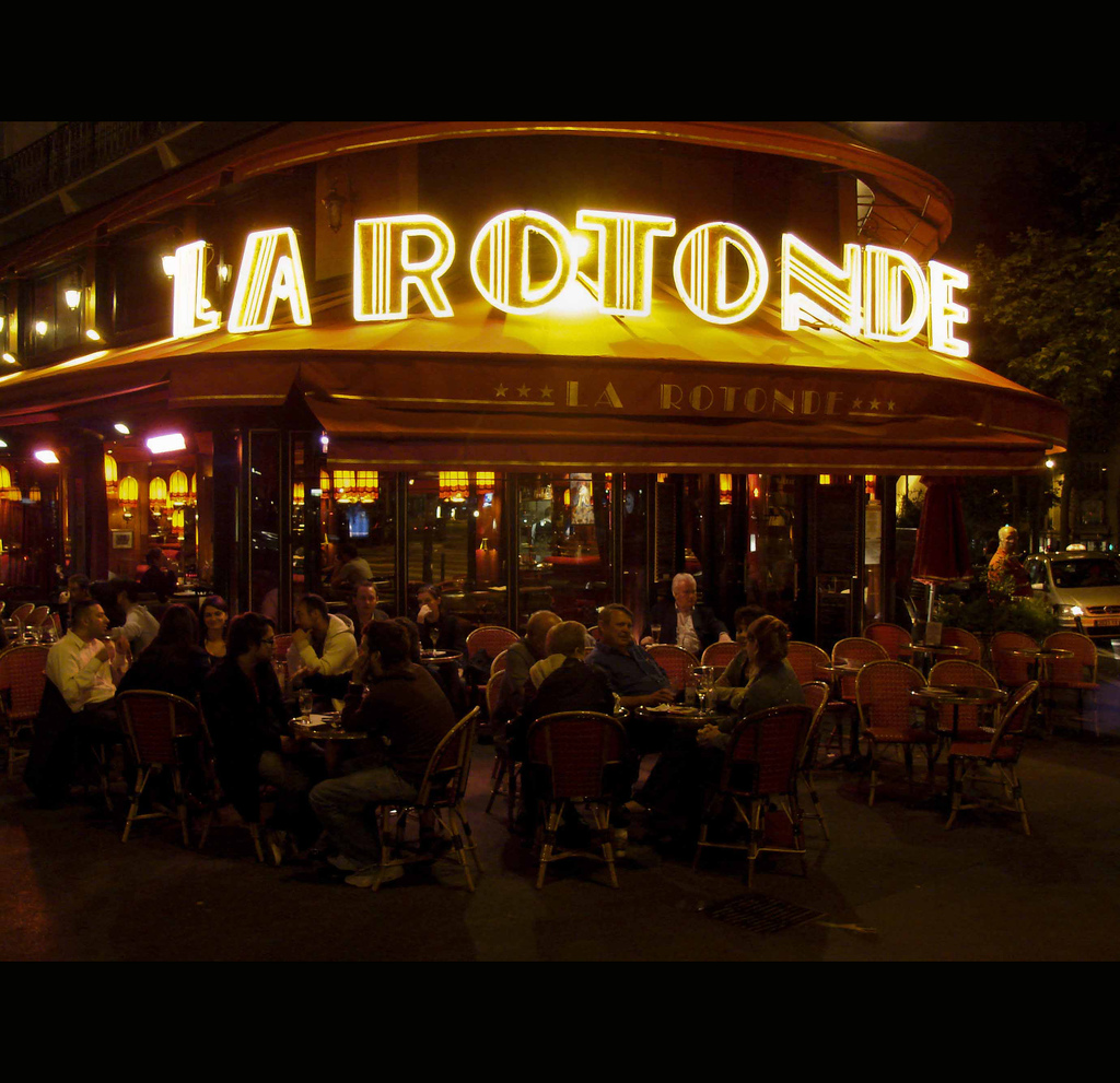 Paris